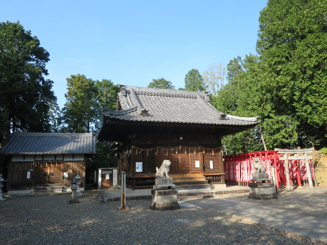 七所神社（岡崎市百々町）